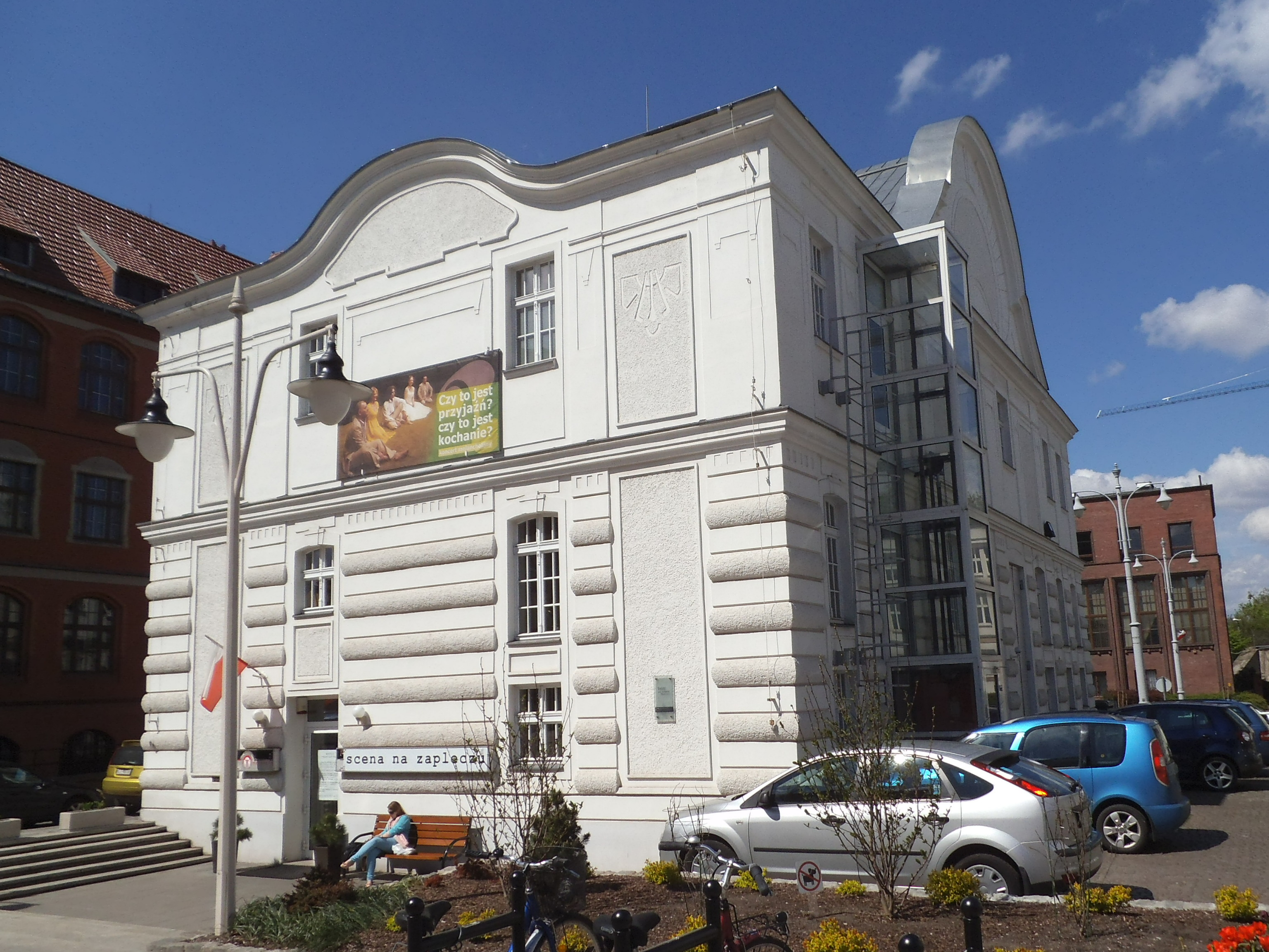 scena na zapleczu torun